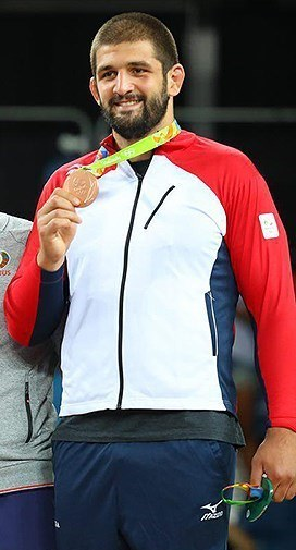 Гено Петриашвили, бронзовый призёр Олимпийских игр в Рио-де-Жанейро в 2016 году